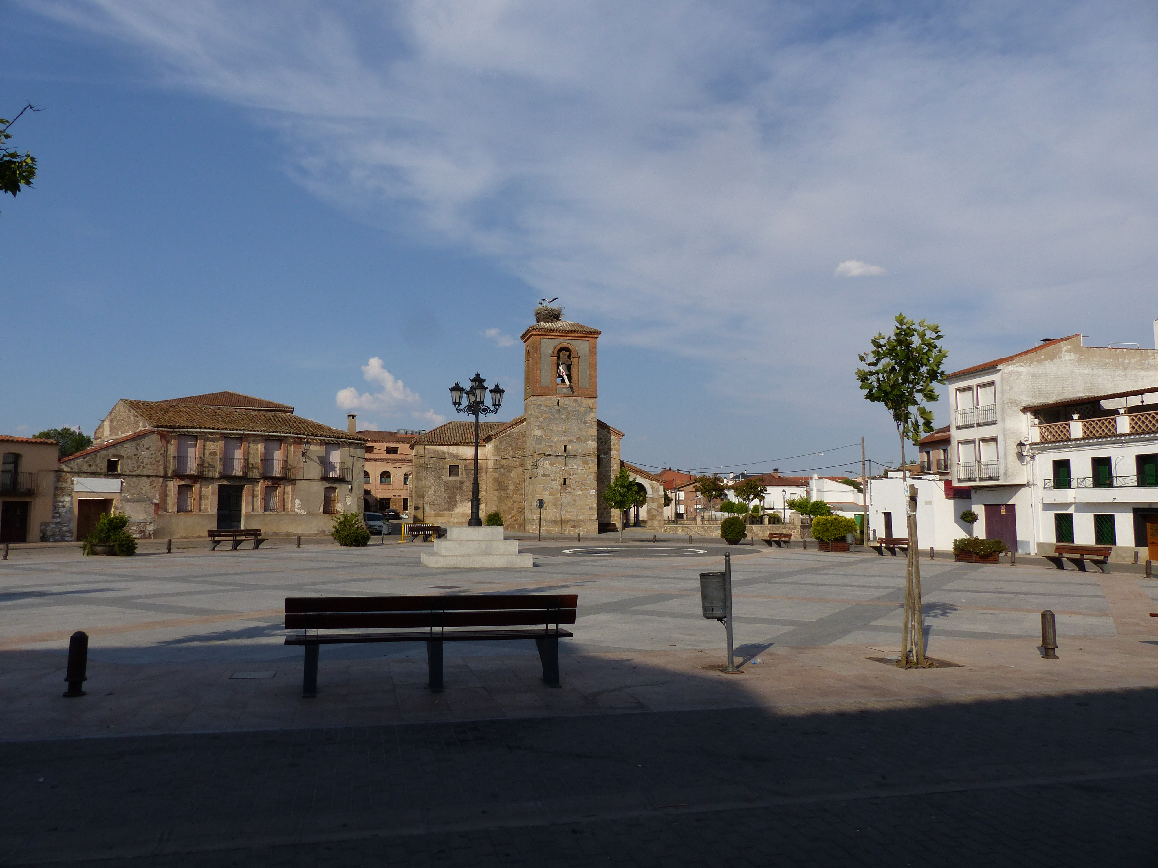 Plaza de la Constitución, Mejorada, Toledo, España